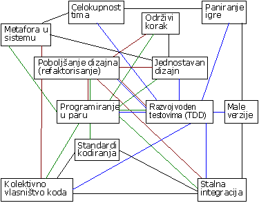 Srpskohrvatski / српскохрватски: Međusobni odnos obaveznih praksi XP